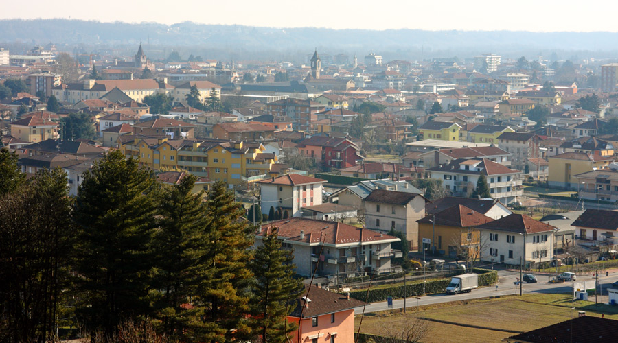 Panorama di Borgomanero (NO) dalla frazione Vergano